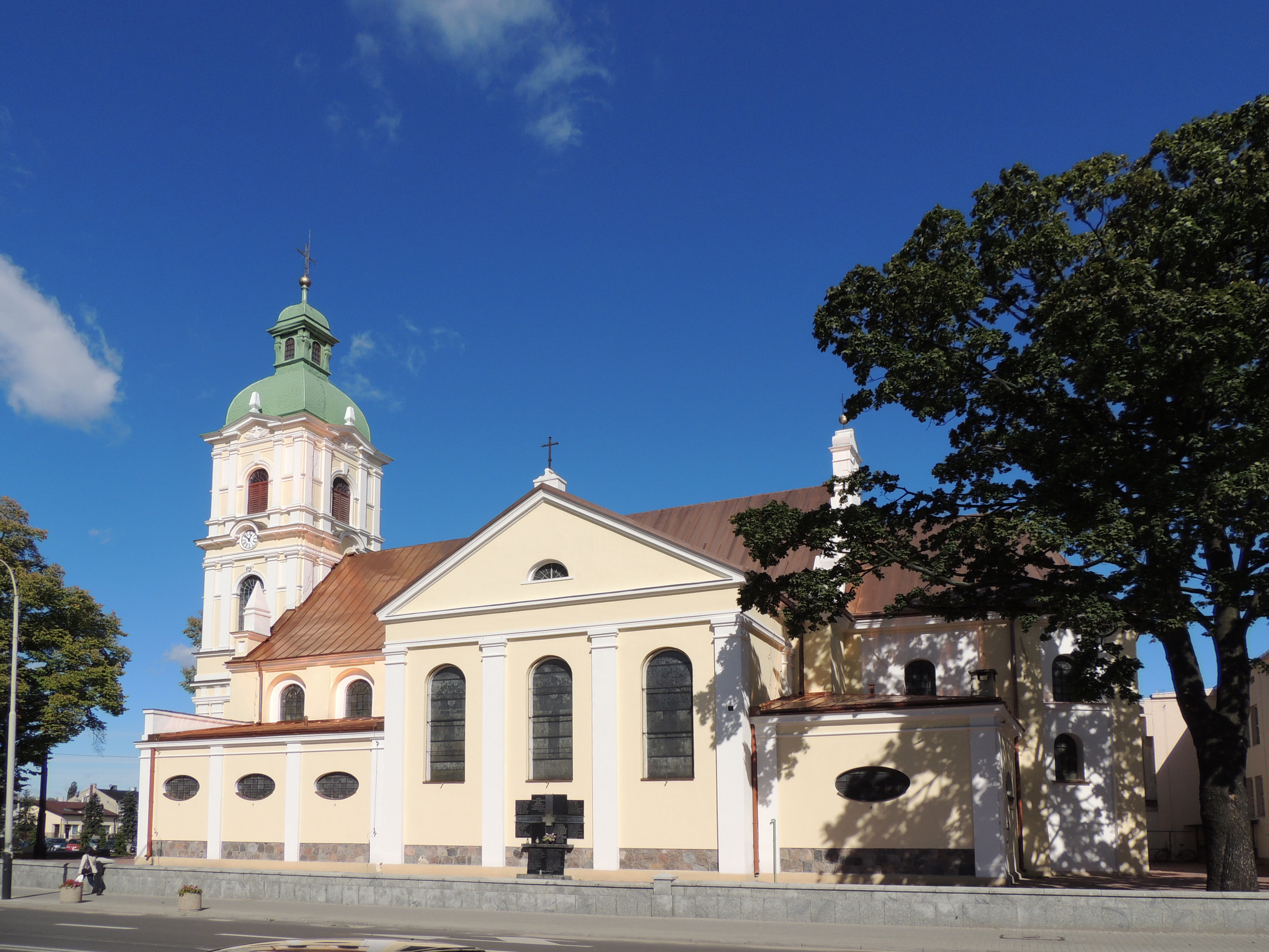 kościół par. pw. św. Józefa, 1668, 1885, 1935 Jana Pawła II 1/3 ul., miasto Ozorków